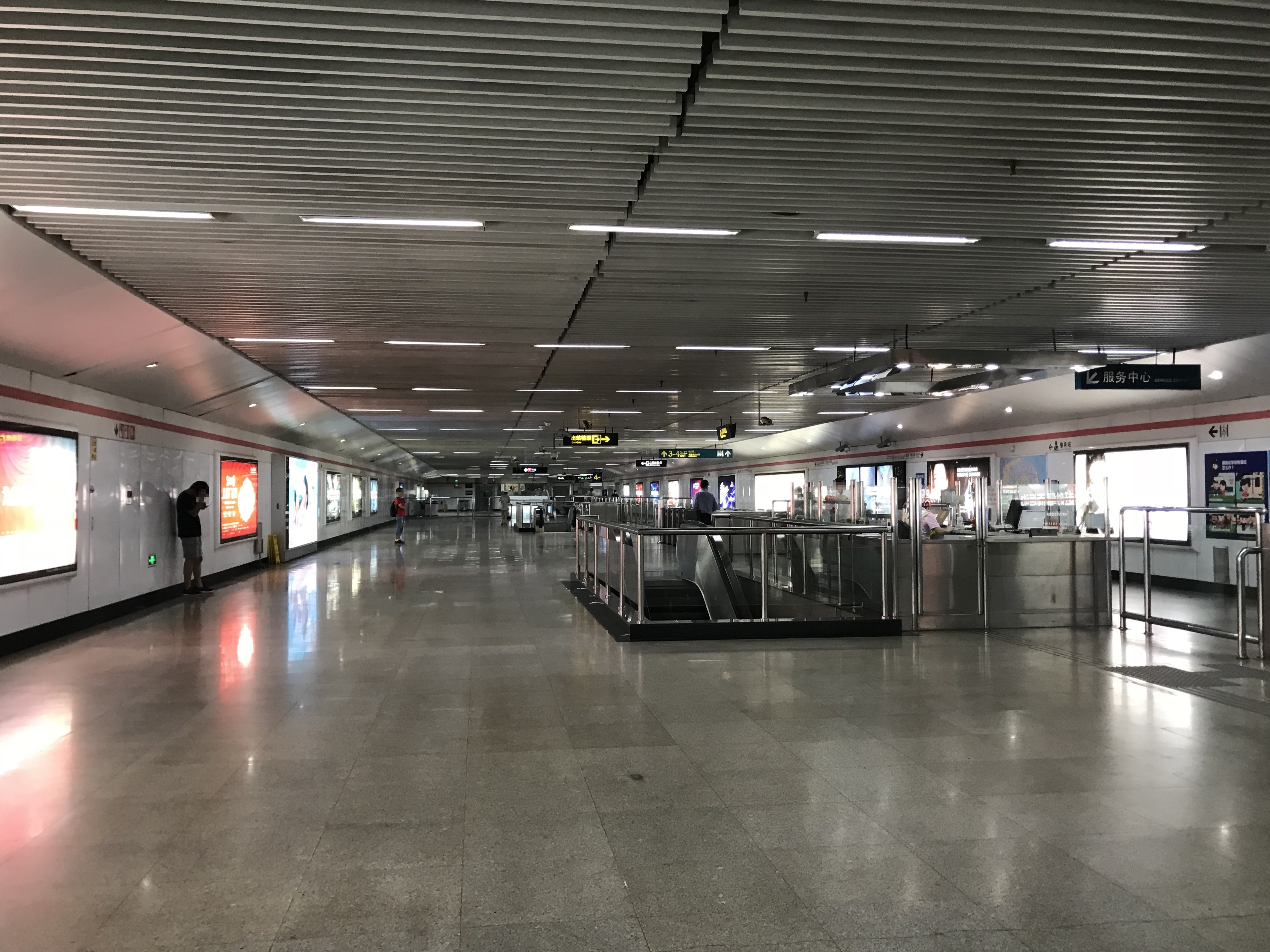 衡山路駅構内